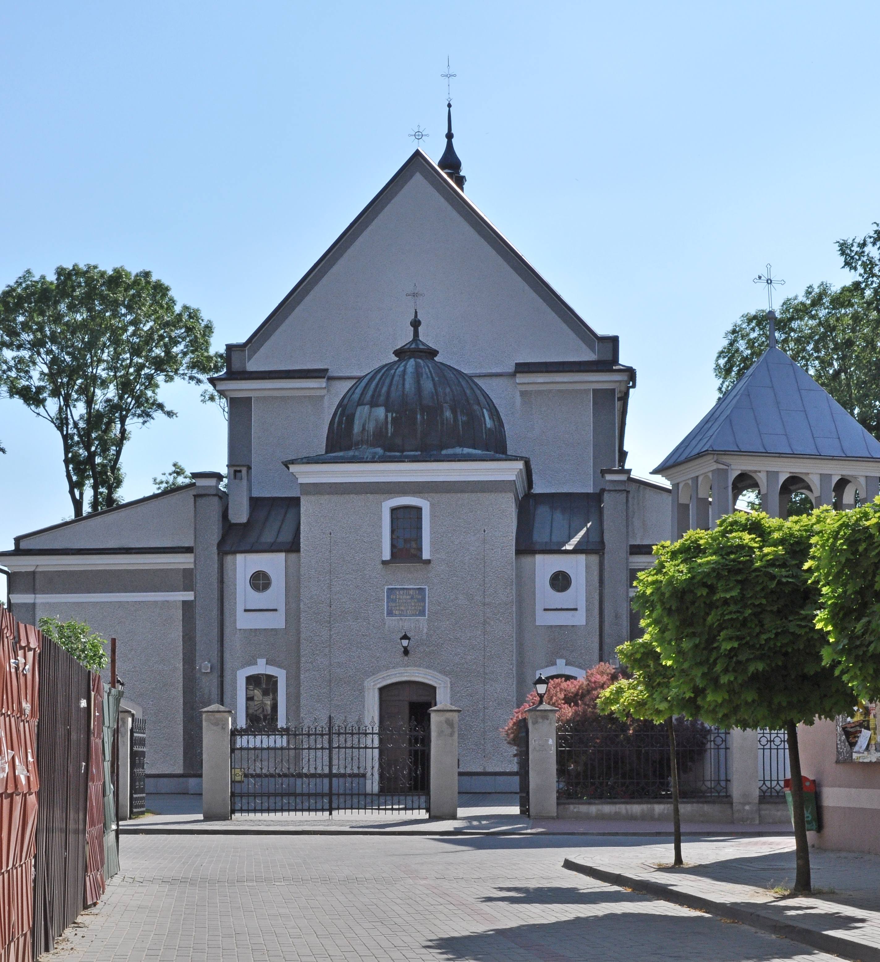 Radomyśl Wielki - kościół parafialny p.w. Przemienienia Pańskiego